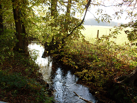 Der Rodenbach bei Kaunitz innerhalb des NSG Grasmeerwiesen